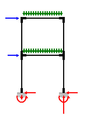 ラーメン構造 01